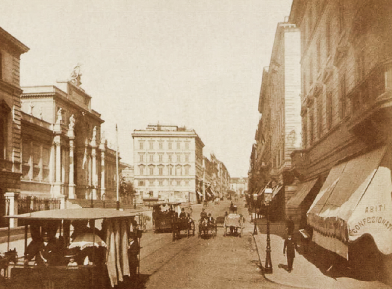 Roma via Nazionale con tram a cavalli (ante 1899, quando i tram divennero elettrici)